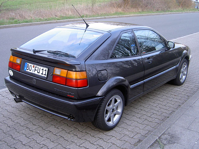 Corrado G60 Rückansicht